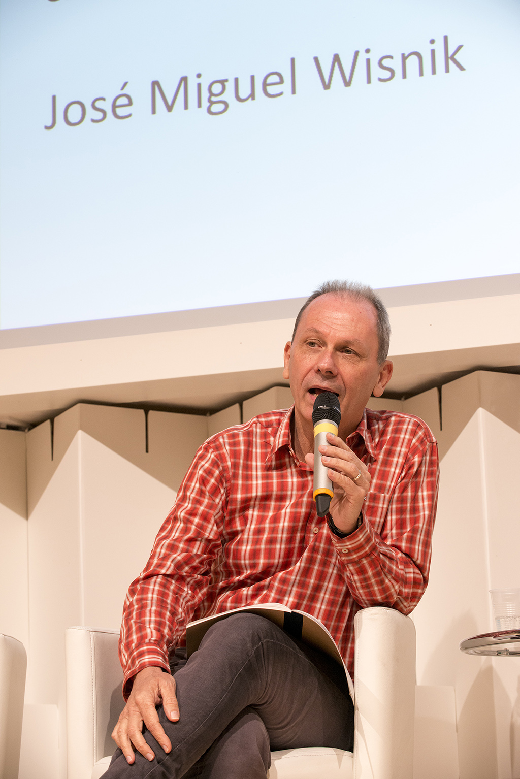 Alemanha | A participação do Brasil na Feira de Frankfurt se deu por meio dos ministérios da Cultura e Relações Exteriores, FBN, Fundação Nacional de Artes (Funarte), Câmara Brasileira do Livro, com apoio da Embratur, Agência Brasileira de Promoção de Exportações e Investimentos (Apex-Brasil) e Sesc São Paulo. bit.ly/1clVotx Foto: Johan Visbeek